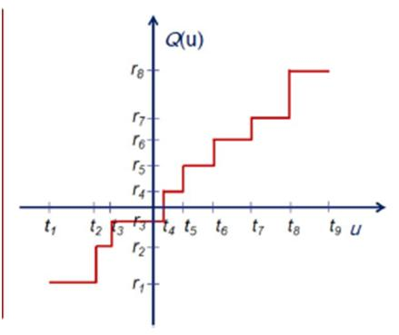 Quantificador uniforme resultant dels nivells de decisió i reconstrucció de la funció Q amb la imatge u